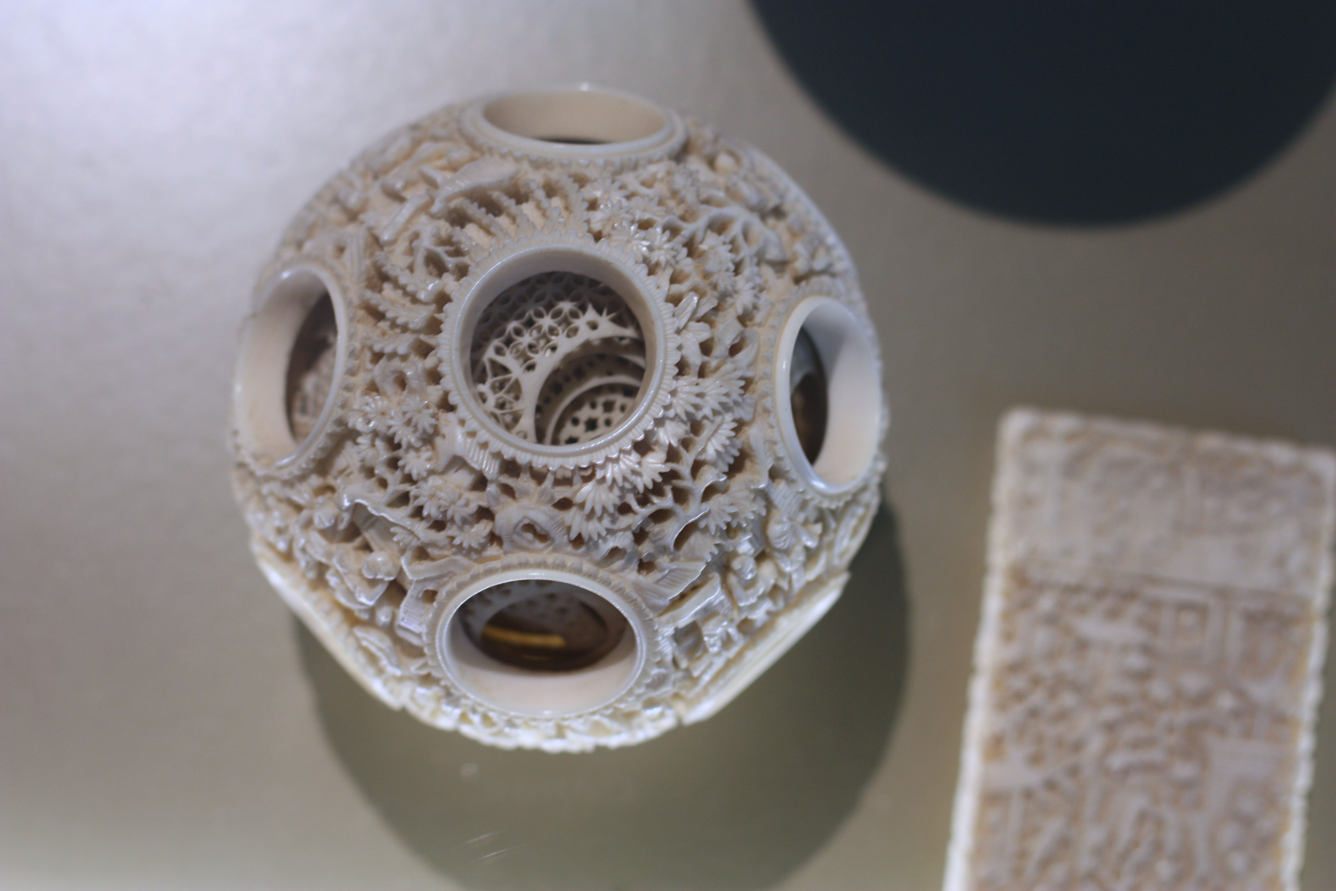 Elfenbeinschnitzerei im Überseemuseum Bremen